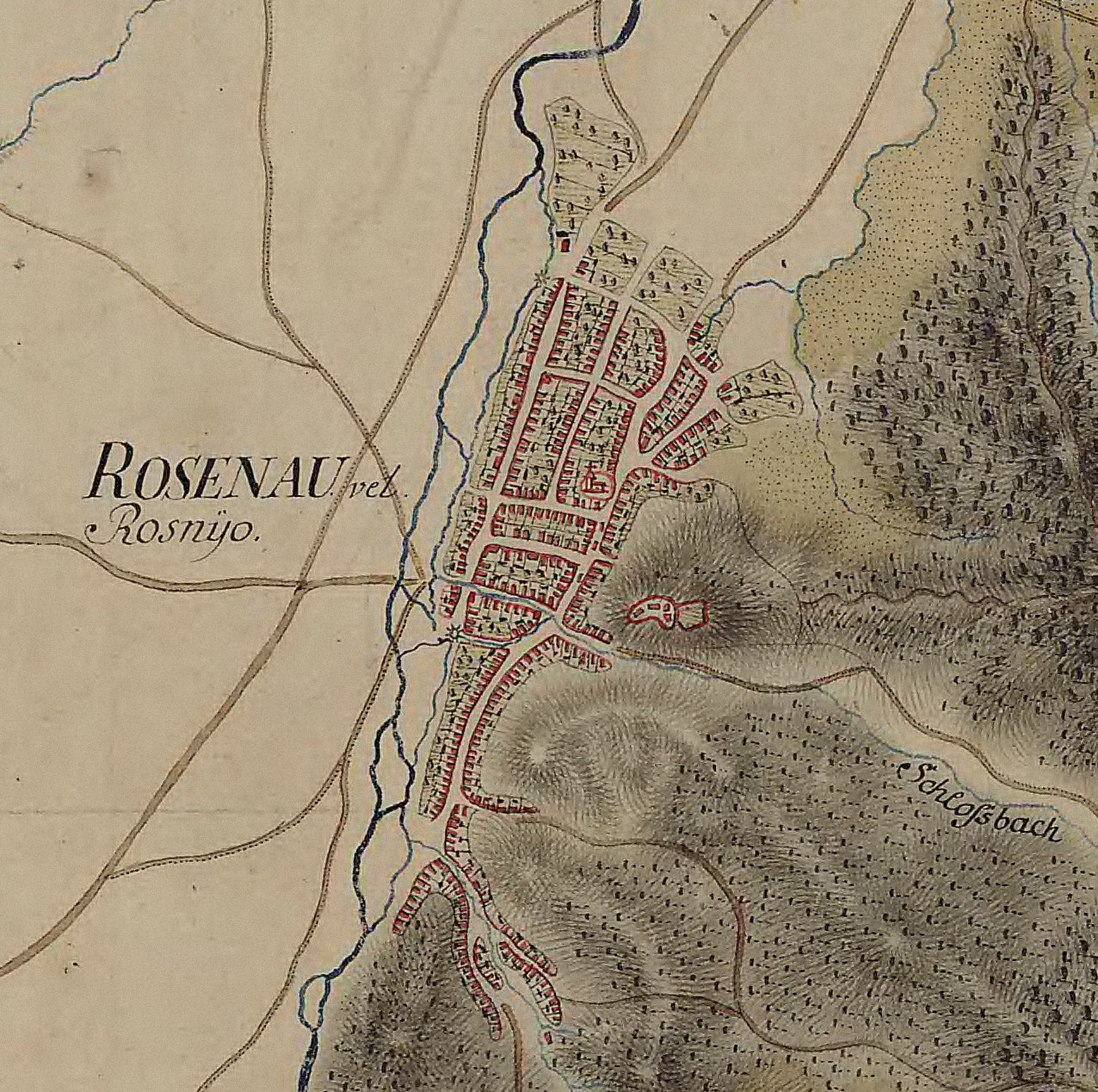 Râşnov şi Cetatea Râşnovului în Harta Iosefină a Transilvaniei.